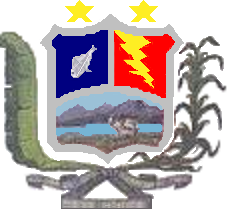 Escudo del municipio Catatumbo, estado Zulia, Venezuela